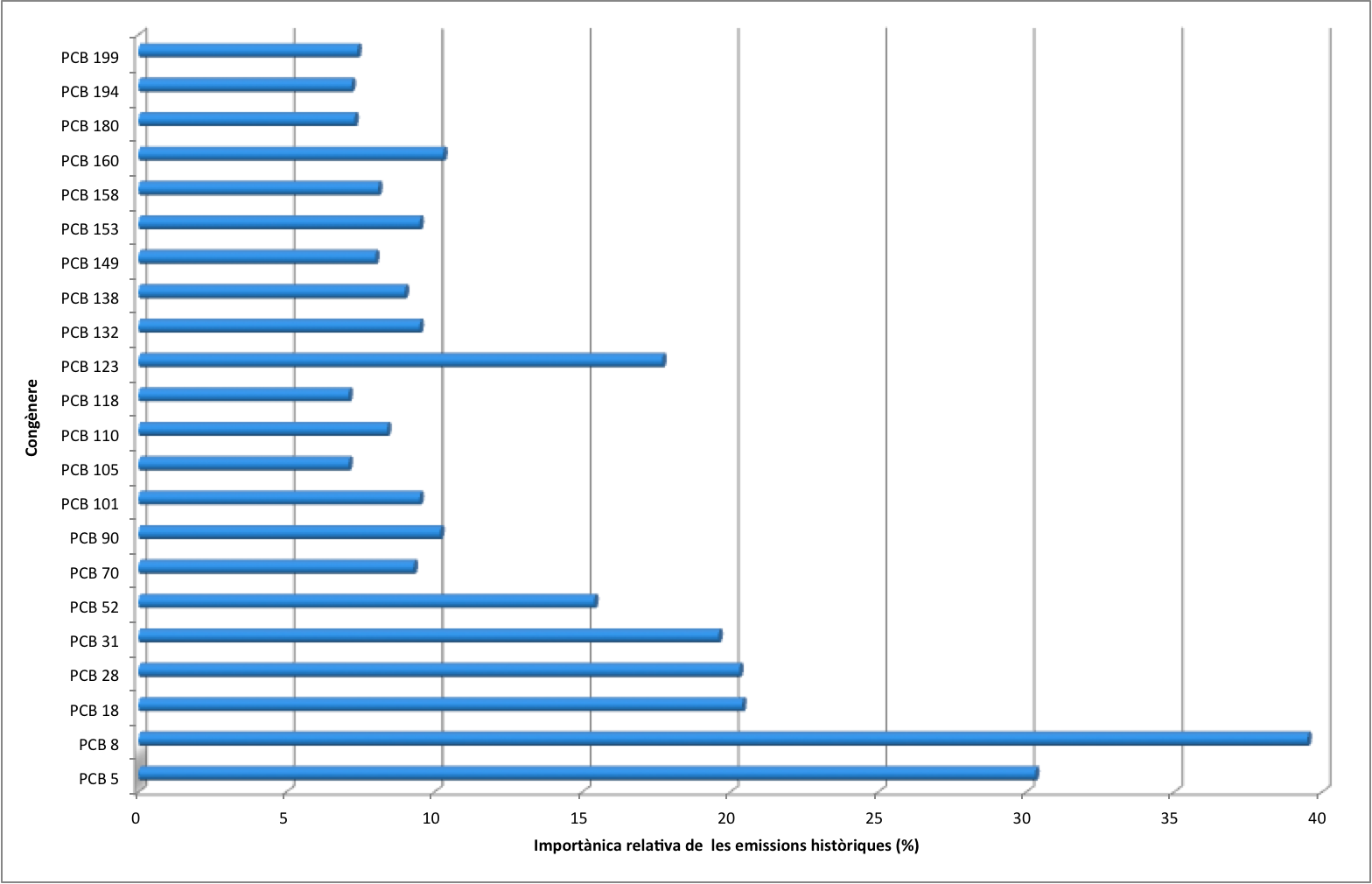 Importància relativa (%) de les emissions històriques per a alguns congèneres de PCB (estimació alta) segons Breivik K et al 2002